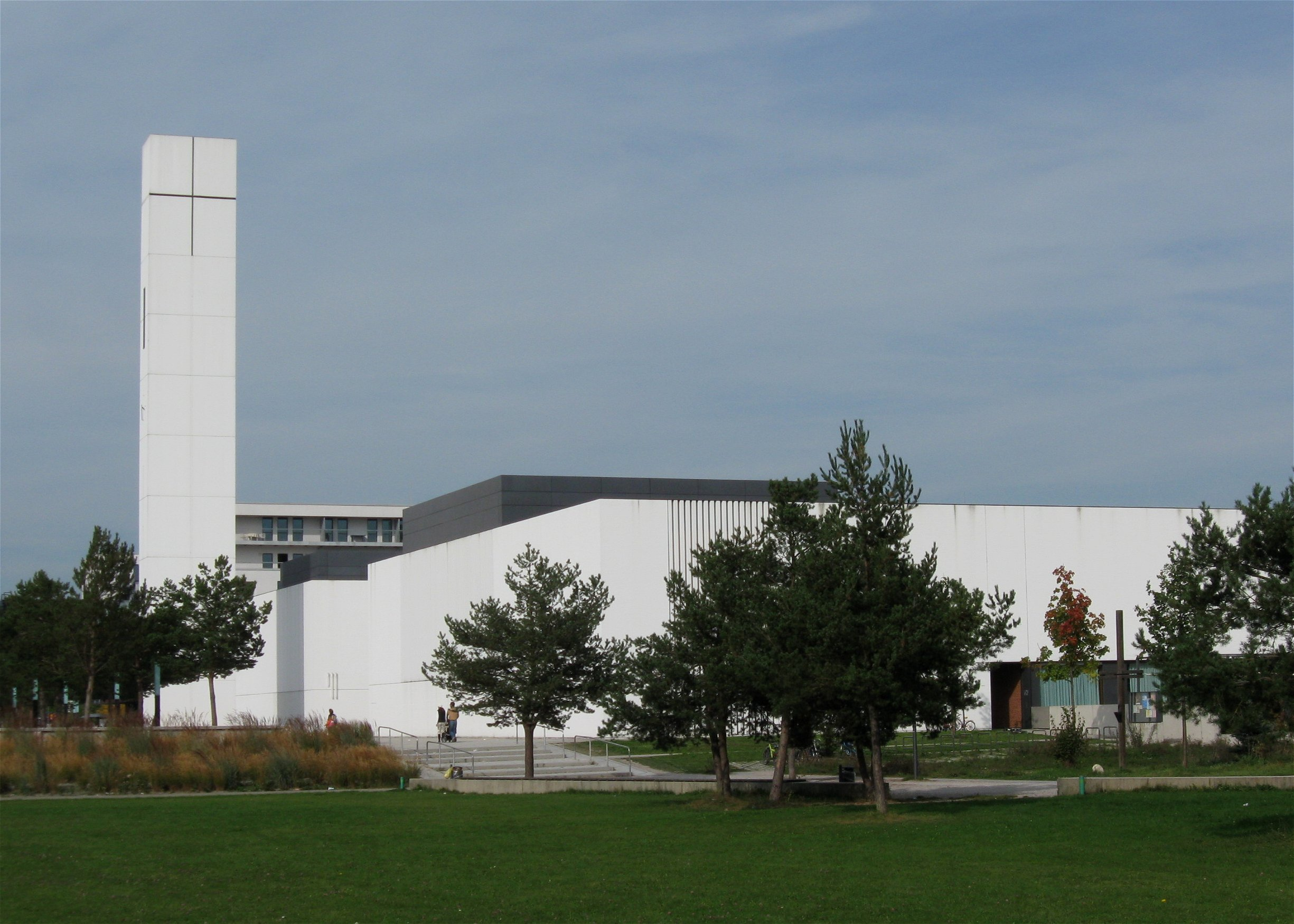 Ökumenisches Kirchenzentrum mit der kath. Kirche St. Florian und der evangelischen Sophienkirche